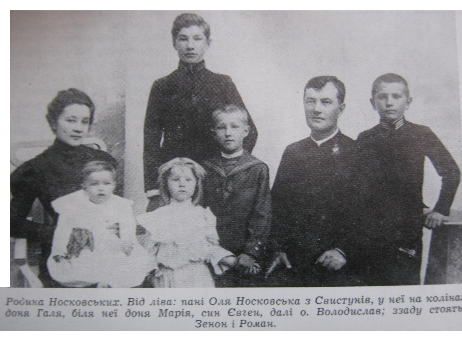 Отець Володислав Носковський з родиною